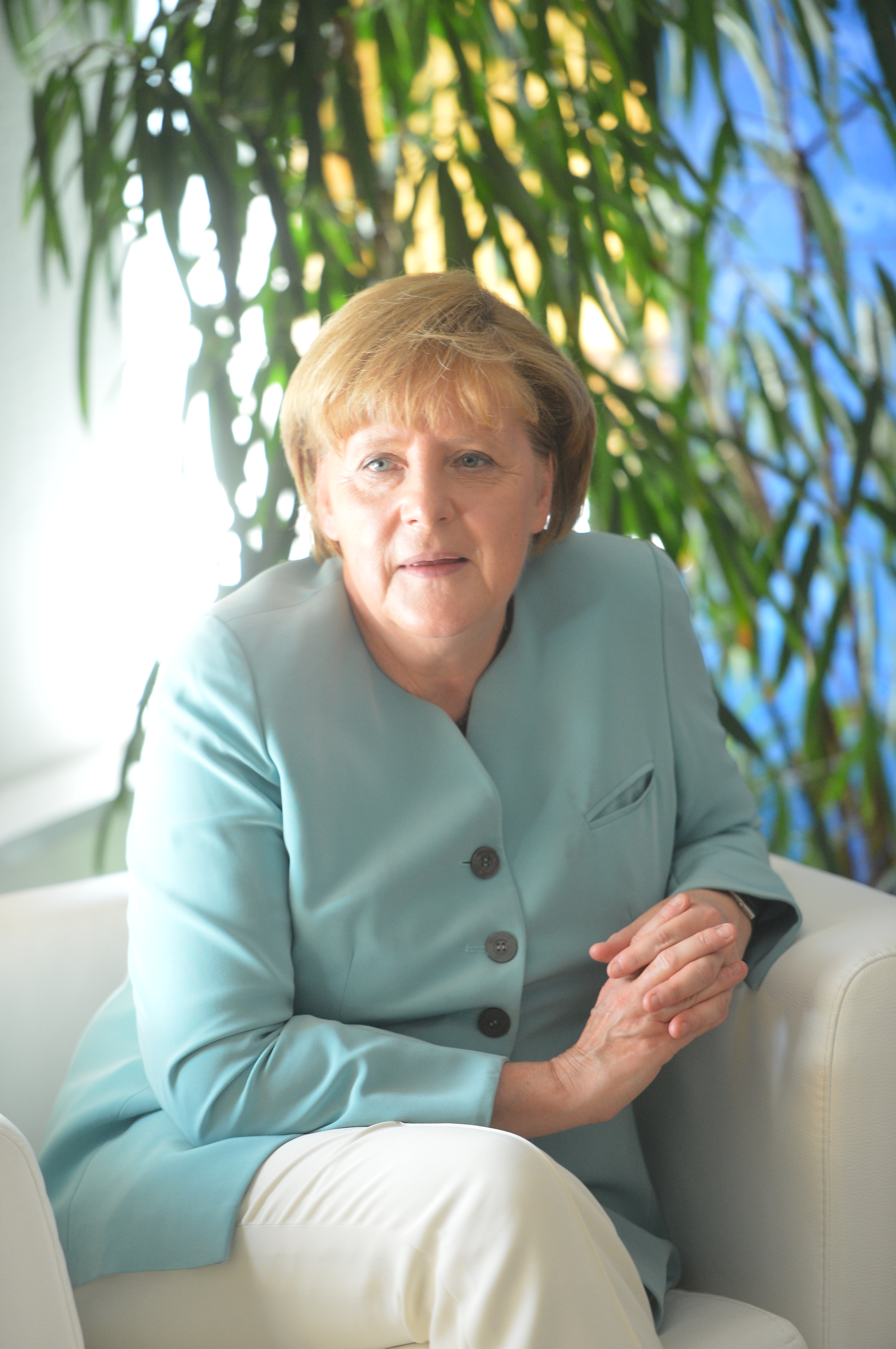 Fotograf: David Plas